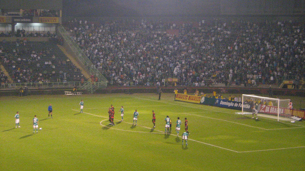 Partida entre Palmeiras e Sport no Palestra Itália